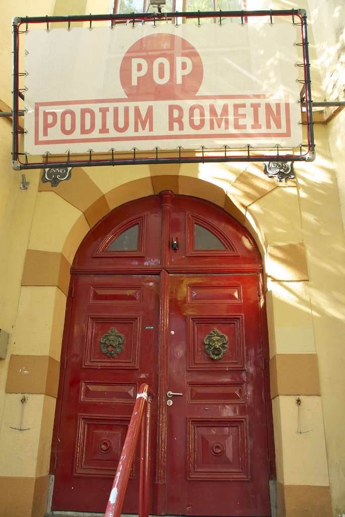 Bagijnestraat 59, Leeuwarden